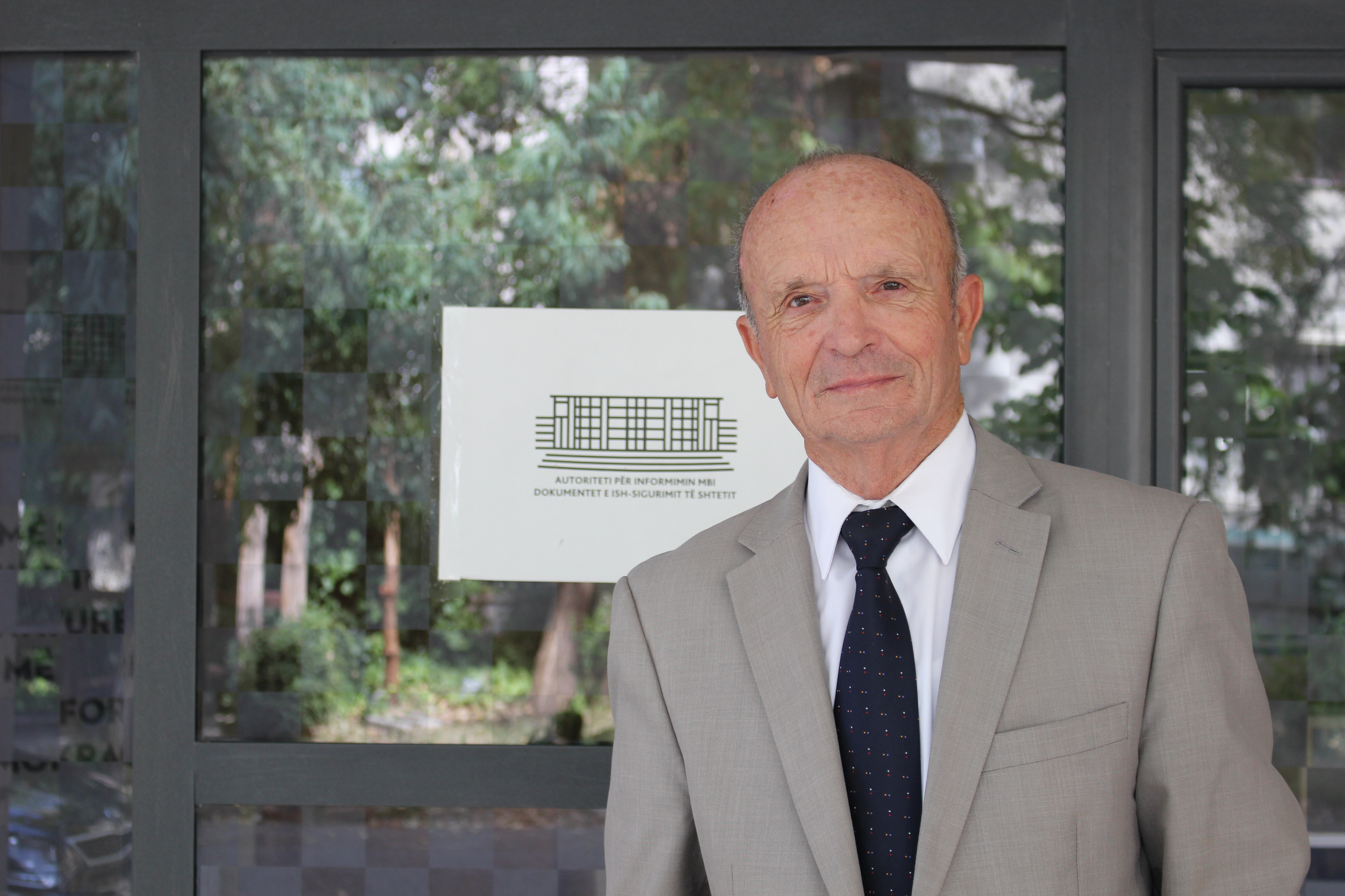 Simon Mirakaj